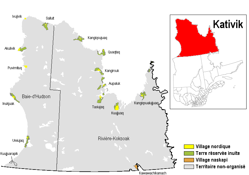 Kativik est une administration régionale qui couvre presque entièrement le territoire du Nunavik, Québec.